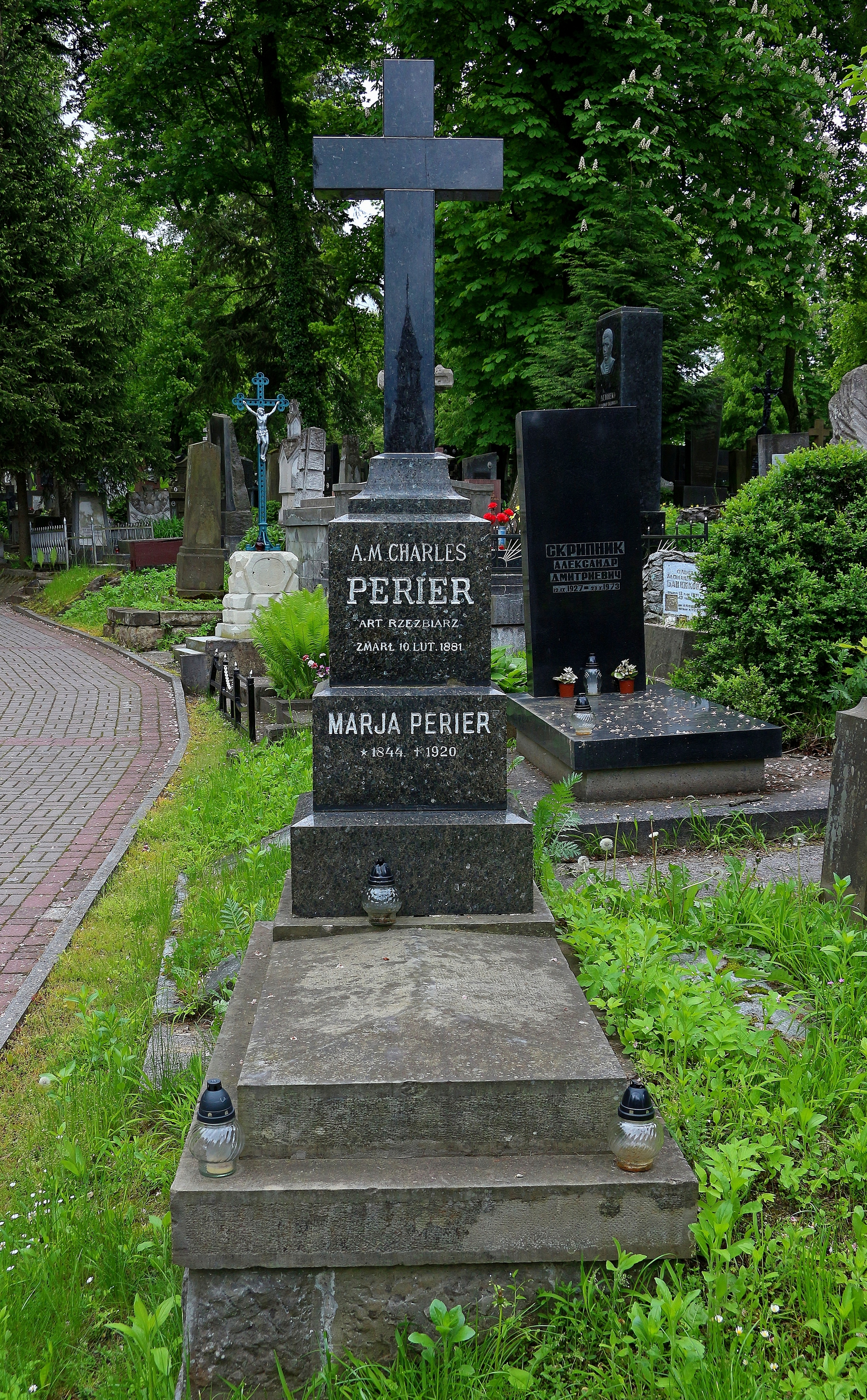 Надгробок А.М.Пер'є.Личаківський цвинтар поле № 4.